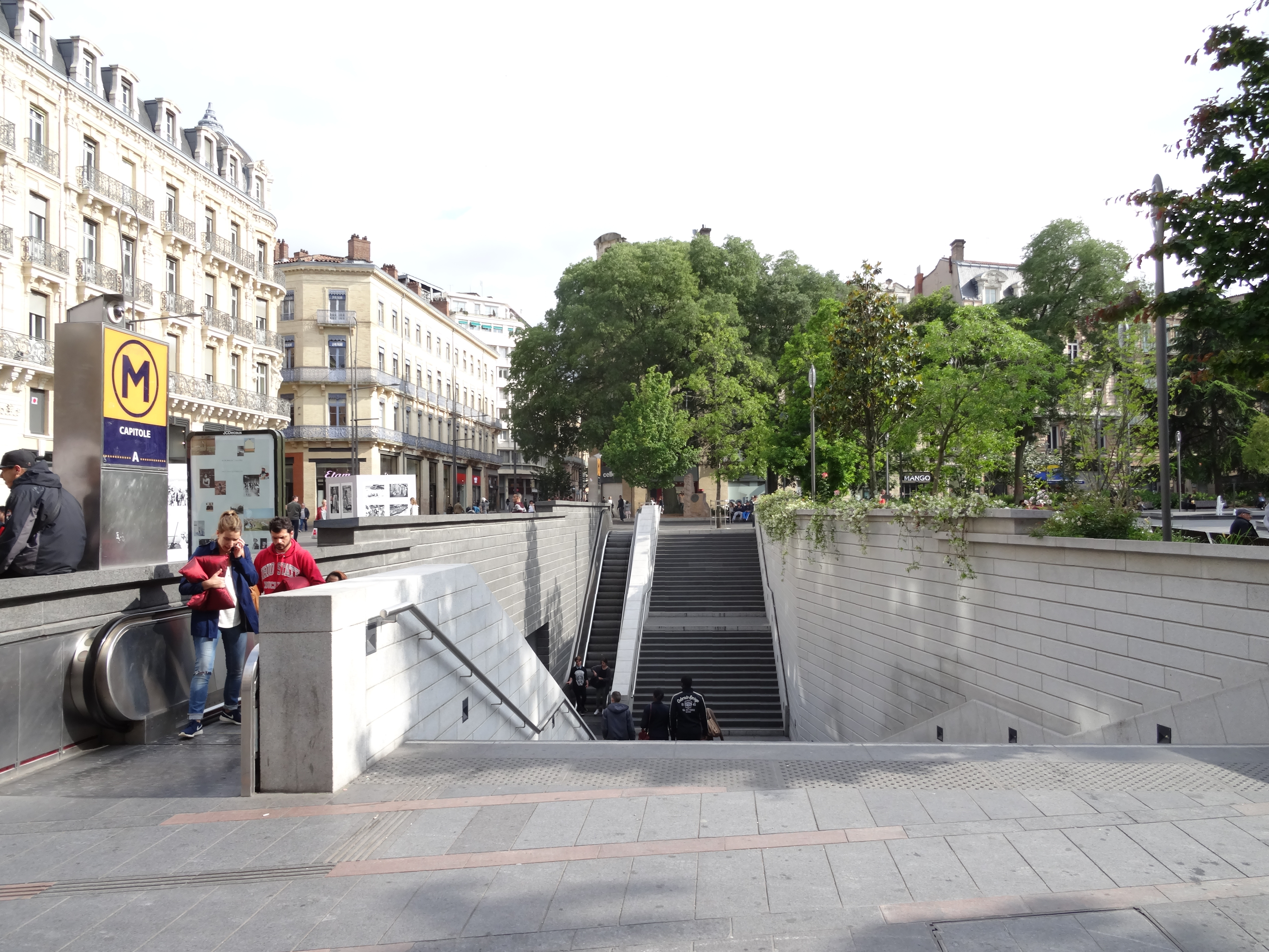 Ligne A